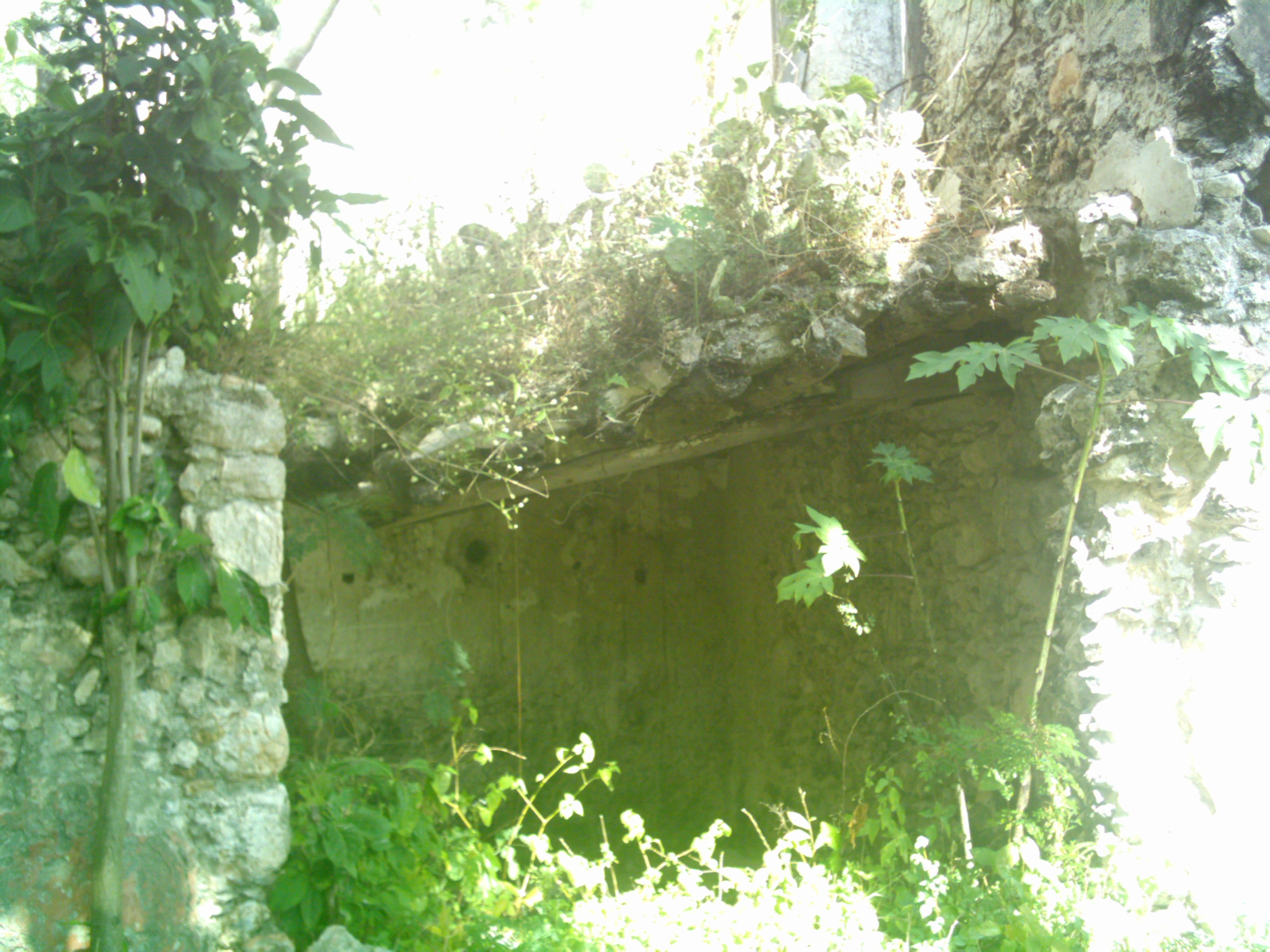 Hacienda de Xcuyún, Yucatán.